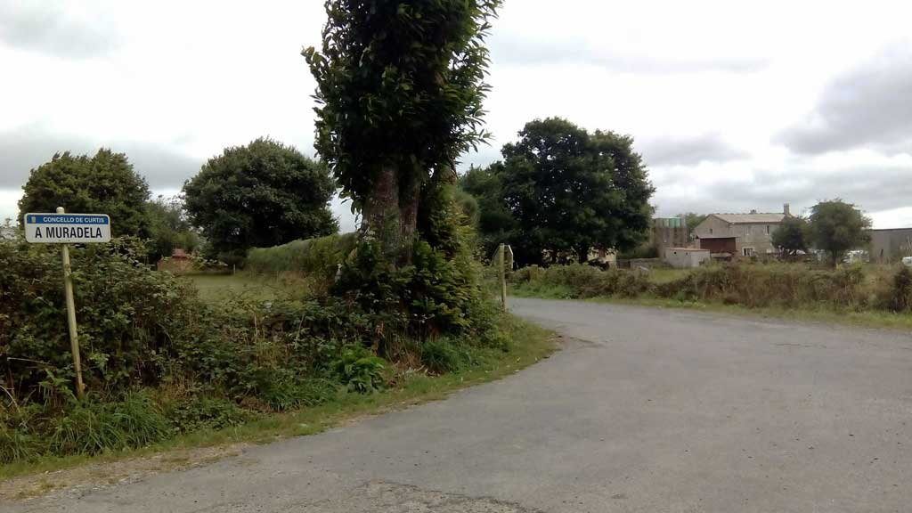 Imaxe da Muradela, Curtis.